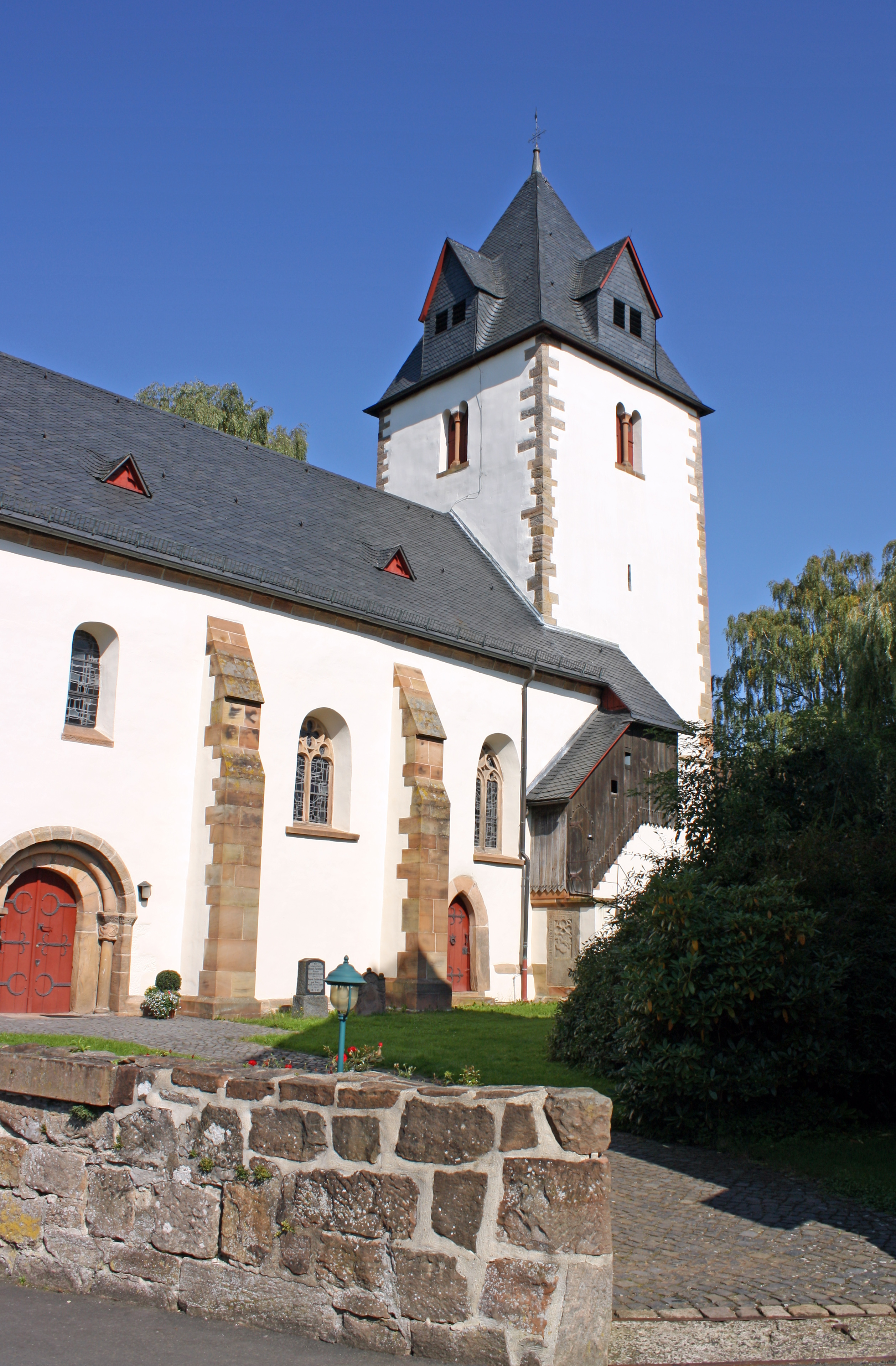 Martinskirche in Michelbach (Marburg)